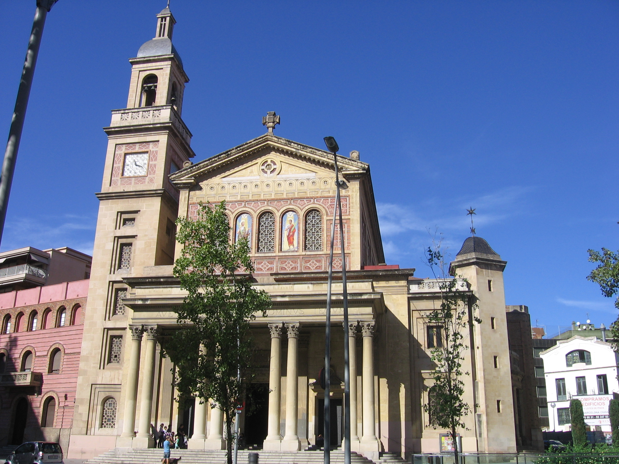 Iglesia de la Bonanova, Barcelona.